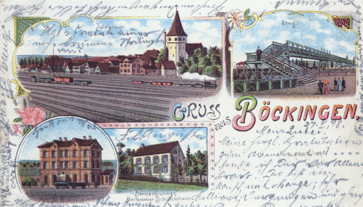 Rangierbahnhof in Heilbronn-Böckingen um 1900